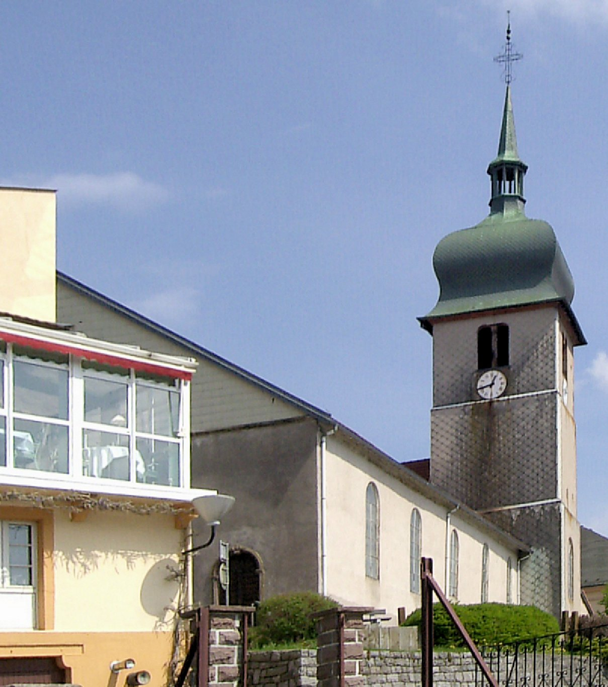 L'église Saint-Joseph à Tholy